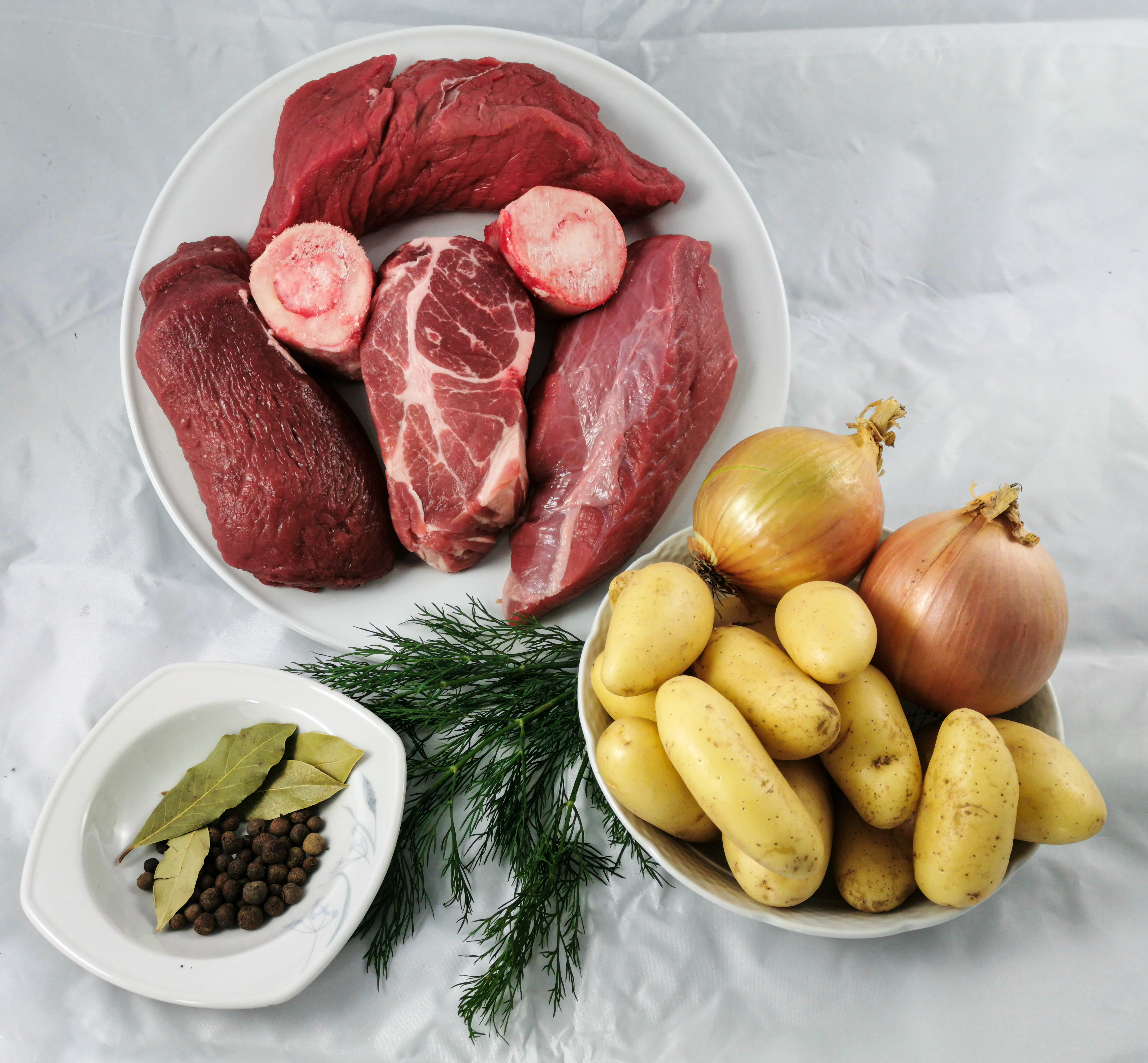 Karjalanpaisti